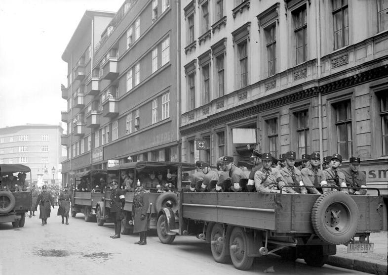 Berliner Schutzpolizei und nationalsozialistische Hilfspolizei, durchsuchen das Berliner Judenviertel in der Grenadierstraße und Dragonerstraße nach kommunistischen Flugblättern und lästigen Ausländern! Schnellwagen der Schutzpolizei und der nationalsozialistischen Hilfspolizei in der Grenadierstaße im Judenviertel in Berlin. [Frühjahr 1933]